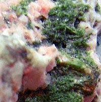 ПироморфитКорка кристаллов пироморфита